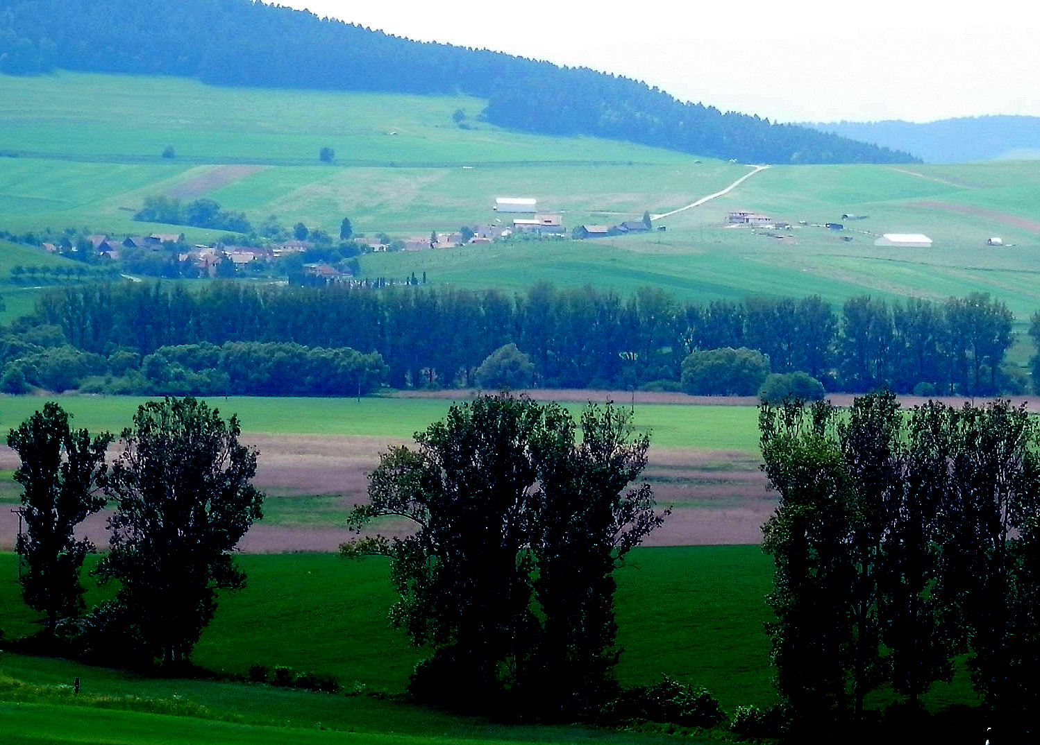 Obec Bulgovce, okres Levoča.